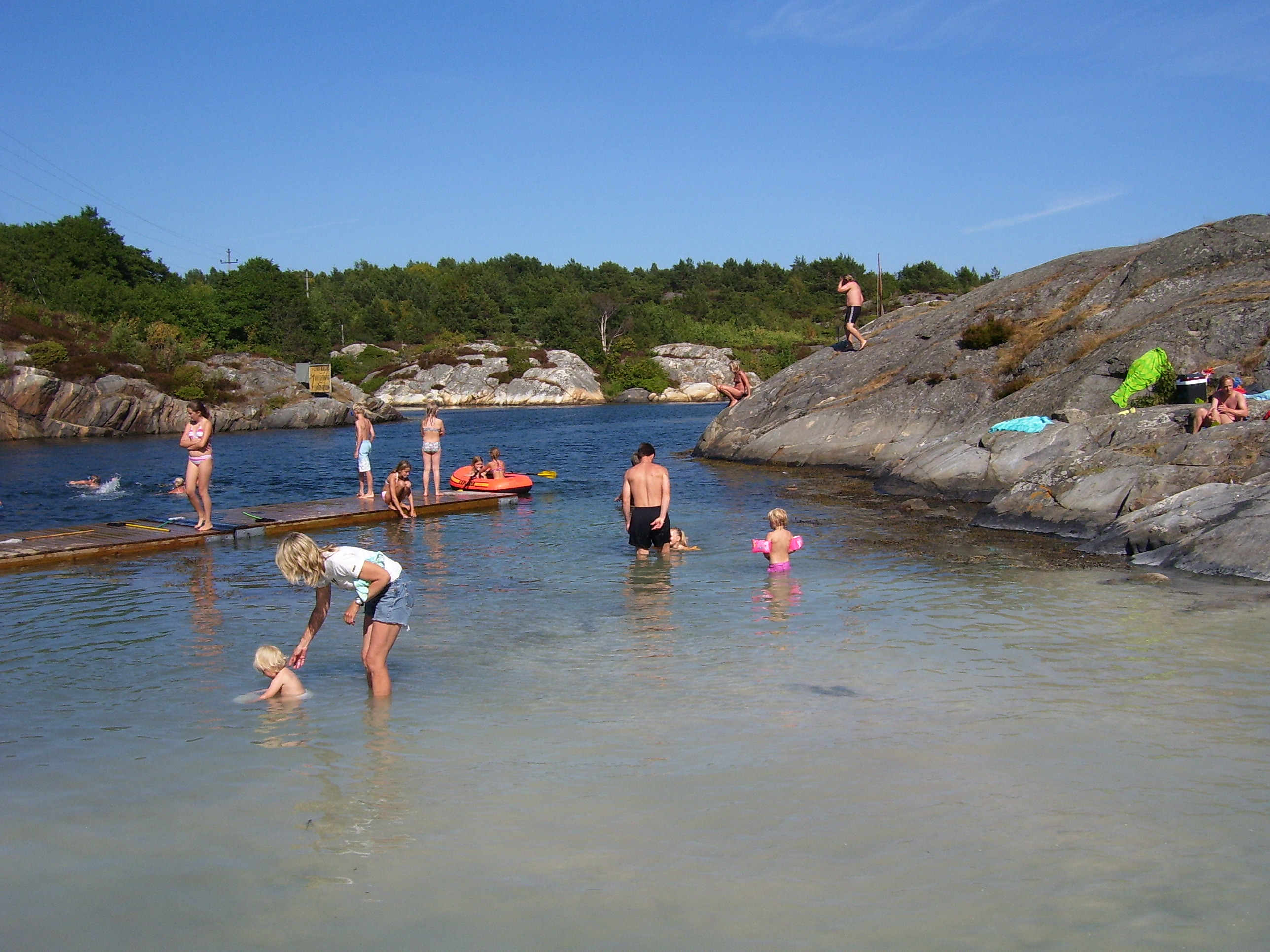 Fra randesund